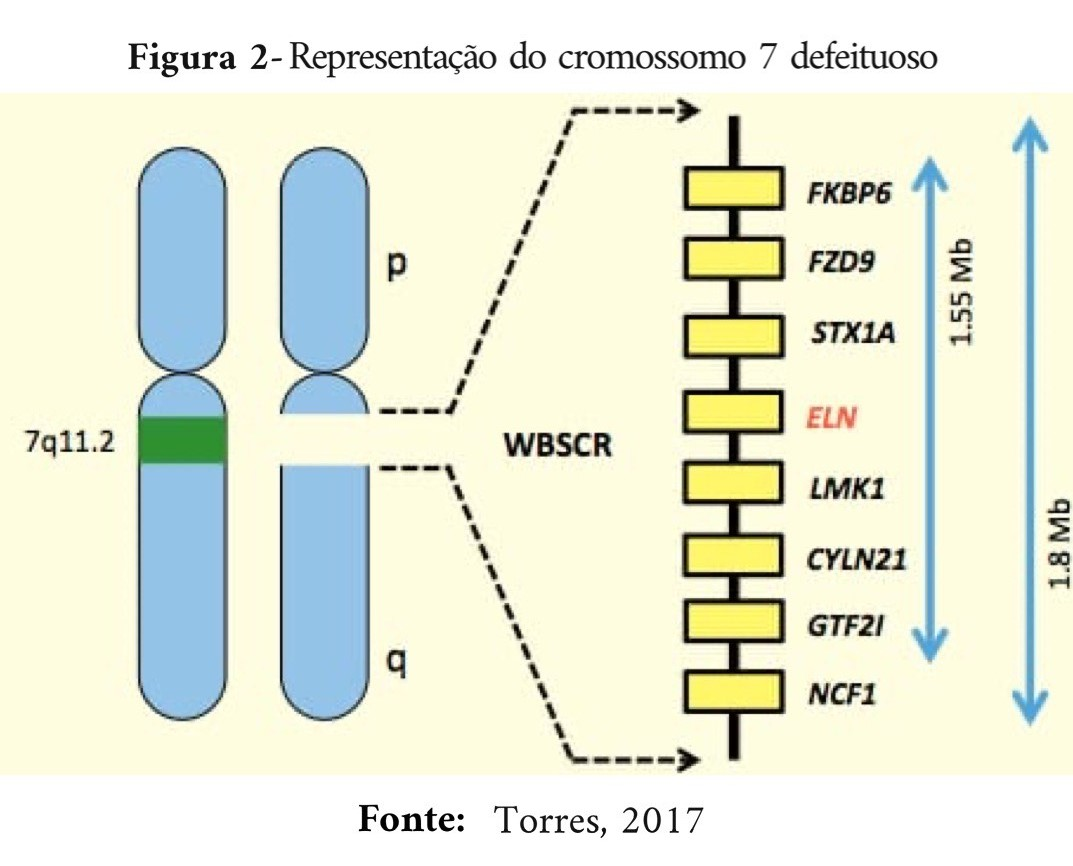 Descrição